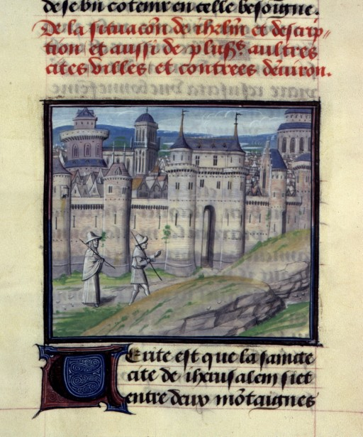 Jérusalem